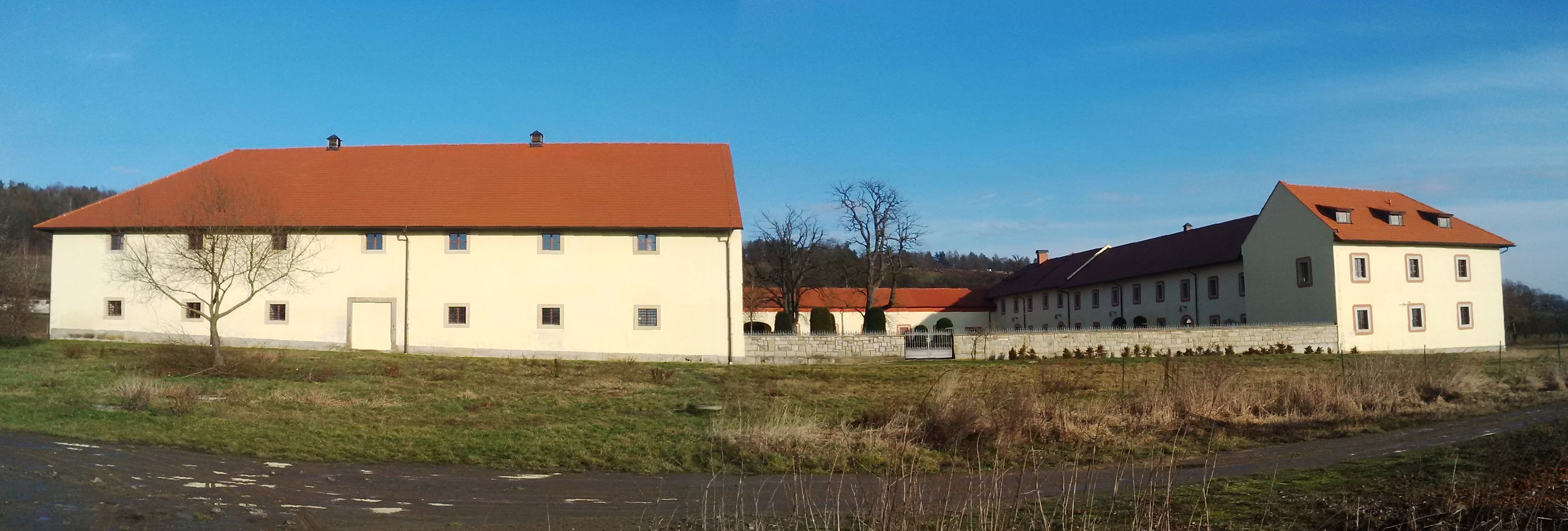 Poplužní statek Červený dvůr založený v 17. století šlechtickým rodem Des Fours. Dnes sídlo soukromé společnosti